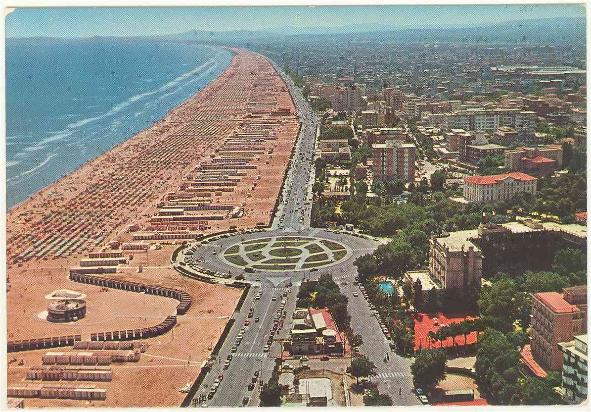 RN Rimini panorama dall'aereo